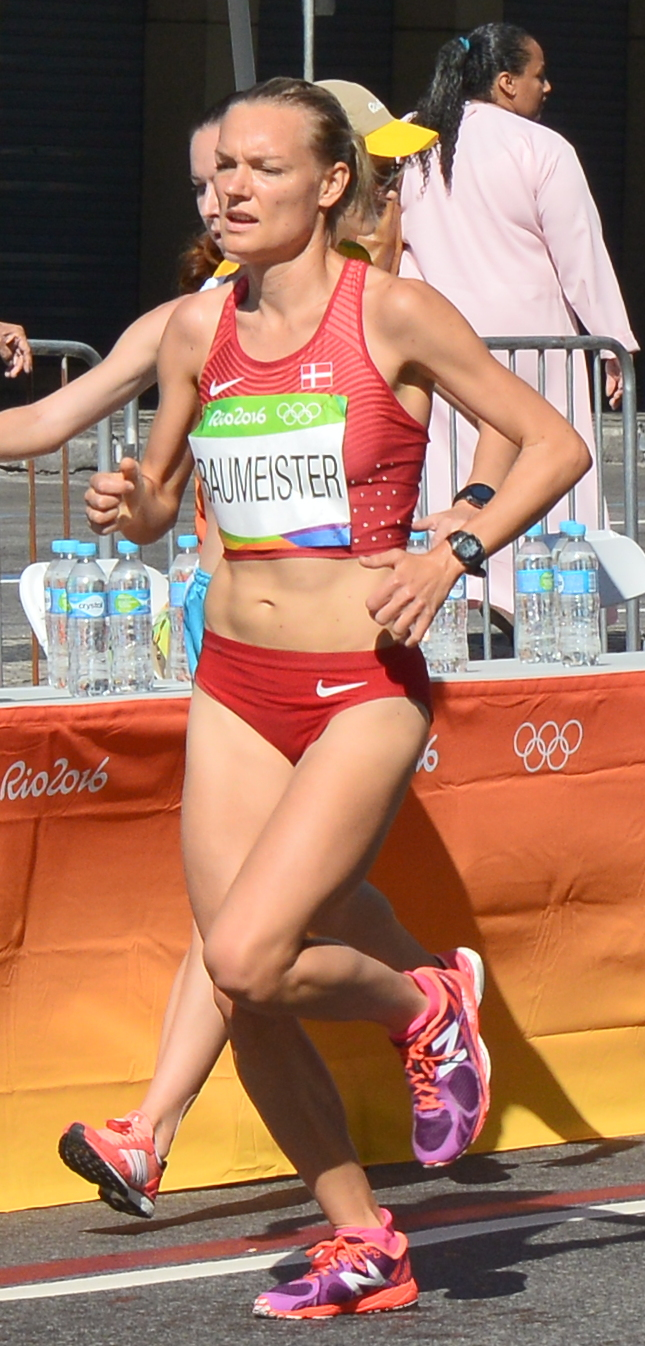 Passage du marathon des jeux olympiques de Rio 2016 dans le centre de Rio